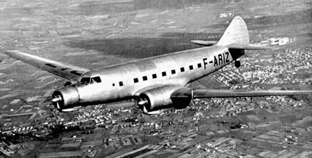 Dewoitine D.342 Air France de Gaston Chenu